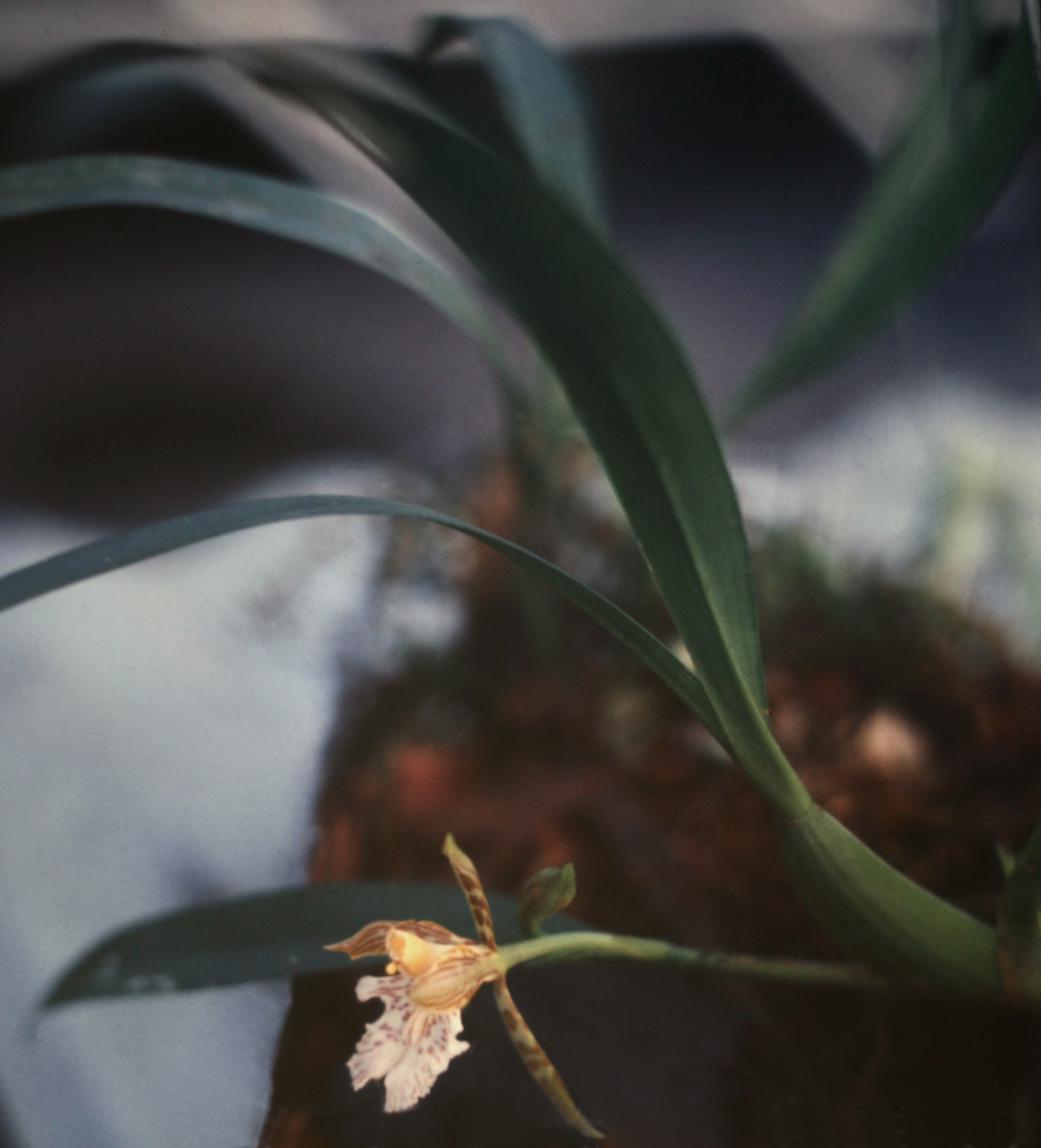 Aspasia variegata, Suriname.